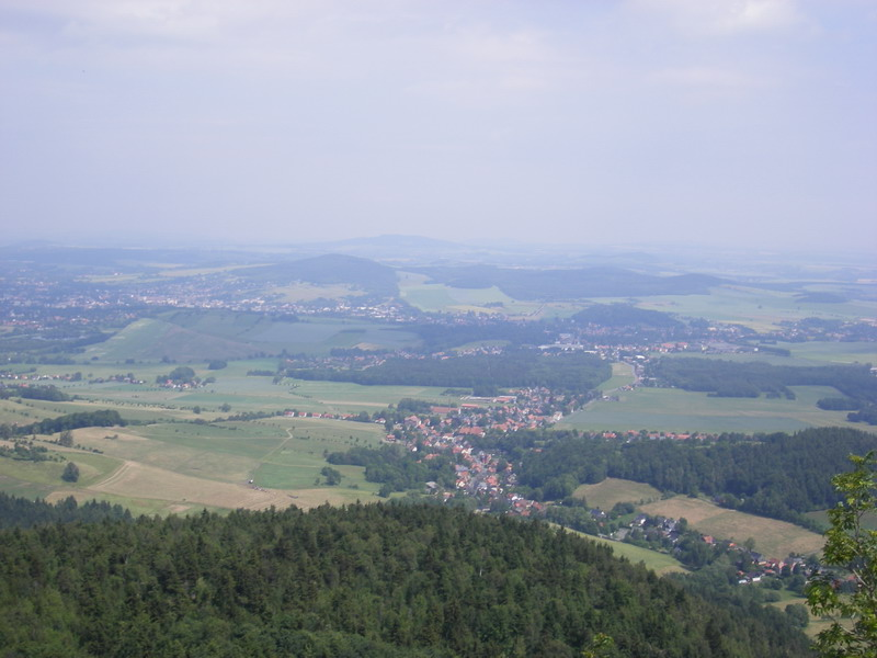 Německá hraniční obec Waltersdorf